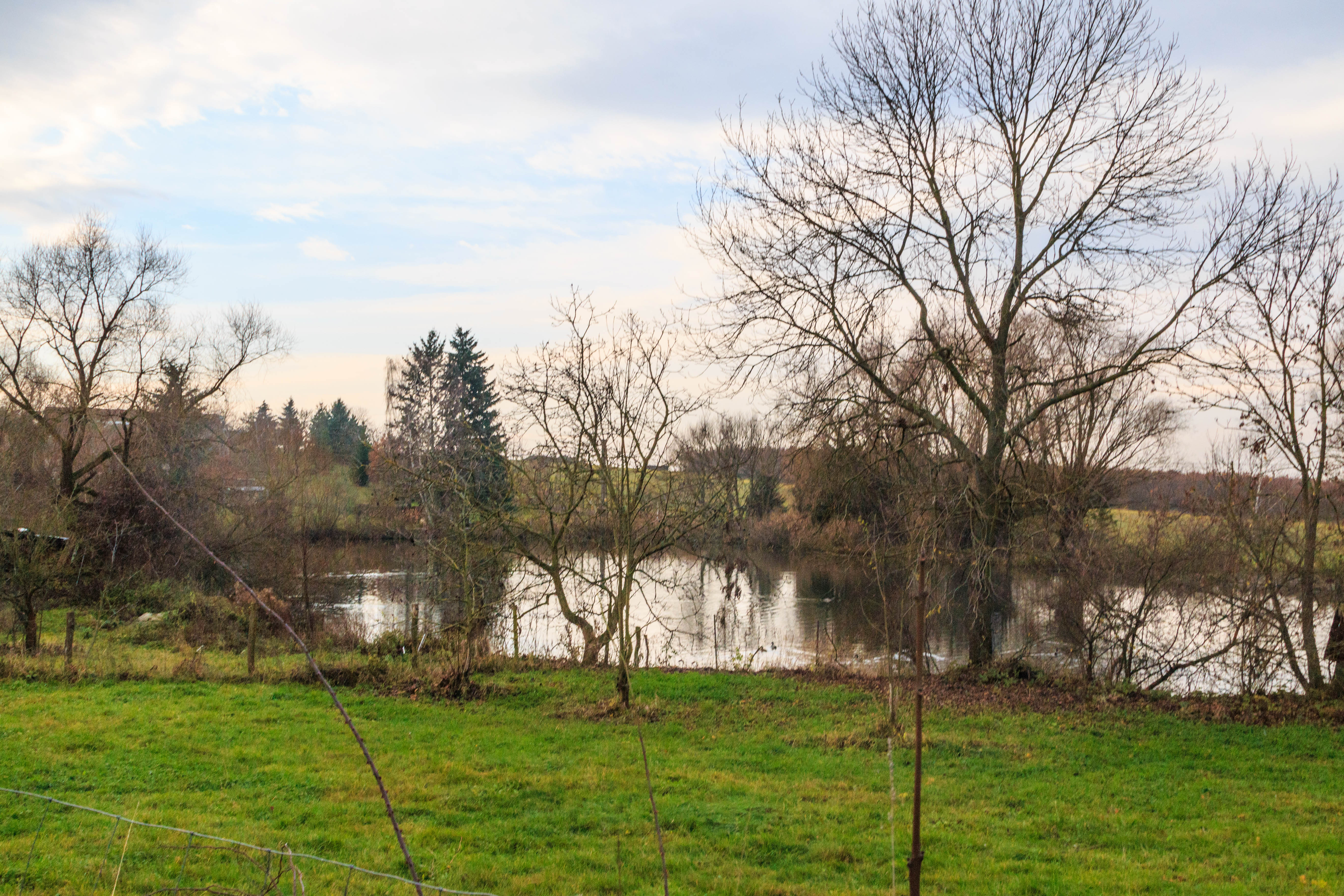 rybník Příkop v Malých Výklekách Project: Vodstvo.